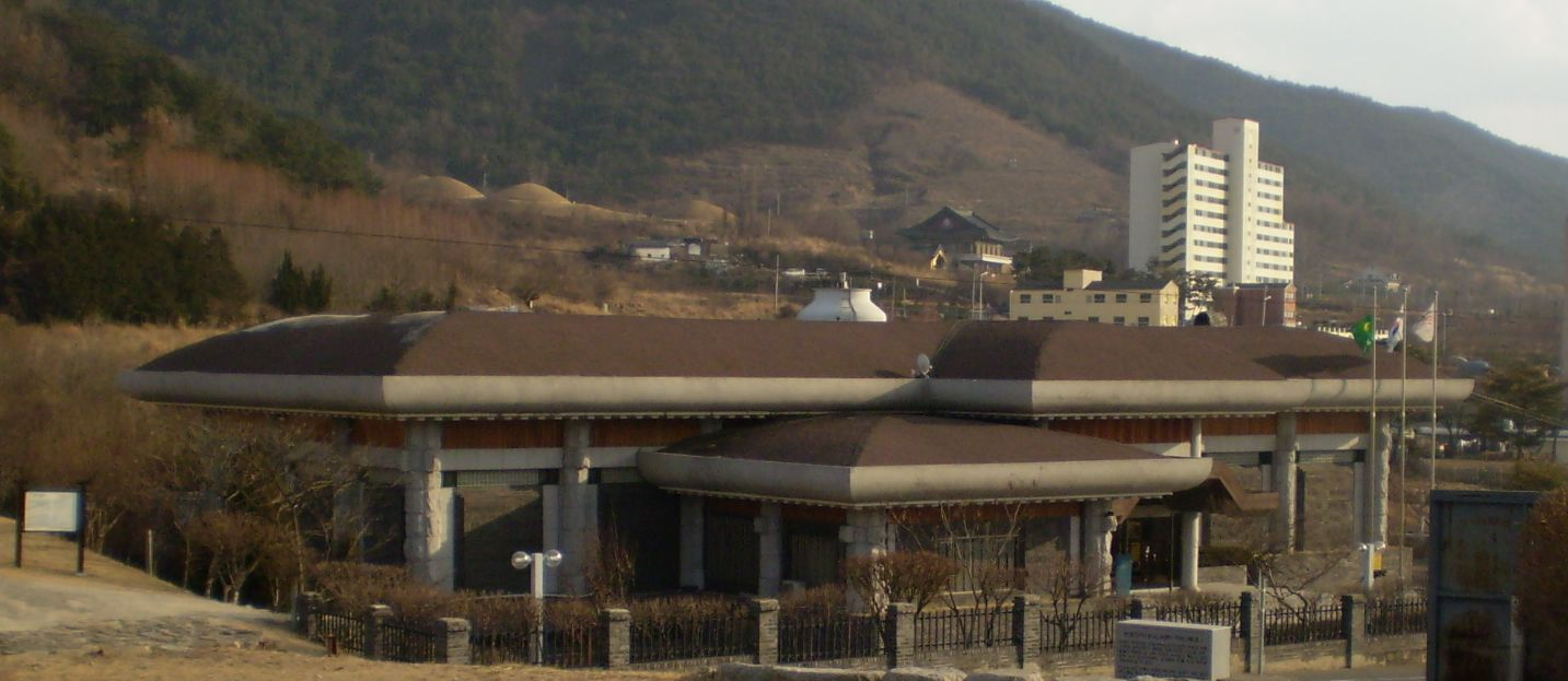 The Changnyeong Museum in Changnyeong, Gyeongsangnam-do, South Korea.